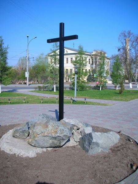 Памятник воинам Ермака в Историческом сквере Тюмени (начало улиц Ленина и Республики)